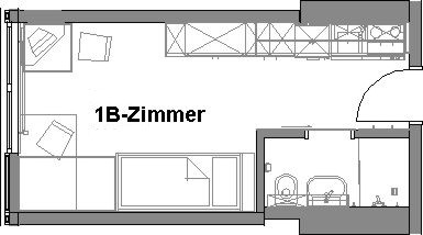 Grundriss eines Einzelzimmers